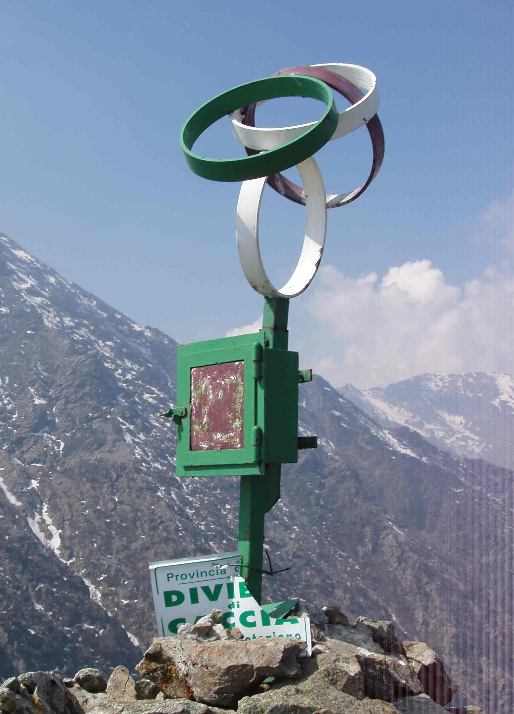 Il segnale metallico sulla Punta Sourela (M.Civrari, Piemonte, Italia)